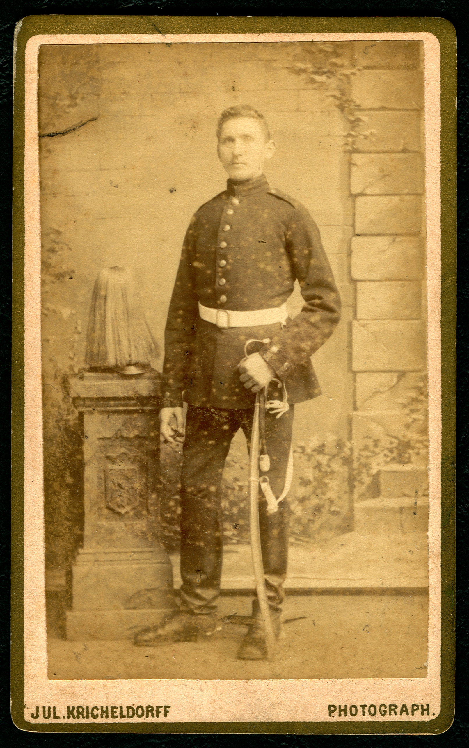 Atelierfotografie von Julius Kricheldorff eines jungen Soldaten mit Säbel und auf der Deko-Säule abgesetztem Paradehelm mit weißem Paradehaarbusch. Das Foto ist erst auf den zweiten Blick als Atelierfotografie zu erkennen: Die scheinbare Mauer im Hintergrund gehörte zu den verschiedenen gemalten Hintergründen, die die Ateliers bei verschiedenen Zulieferern käuflich erwerben konnten. Die Carte de visite ist im Lauf der Zeit ausgeblichen und hat Stockflecken bekommen.